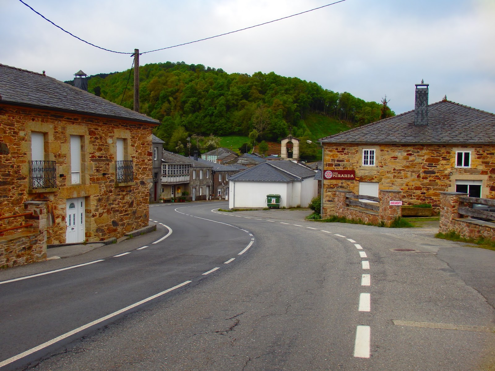 A Lastra, Baleira.